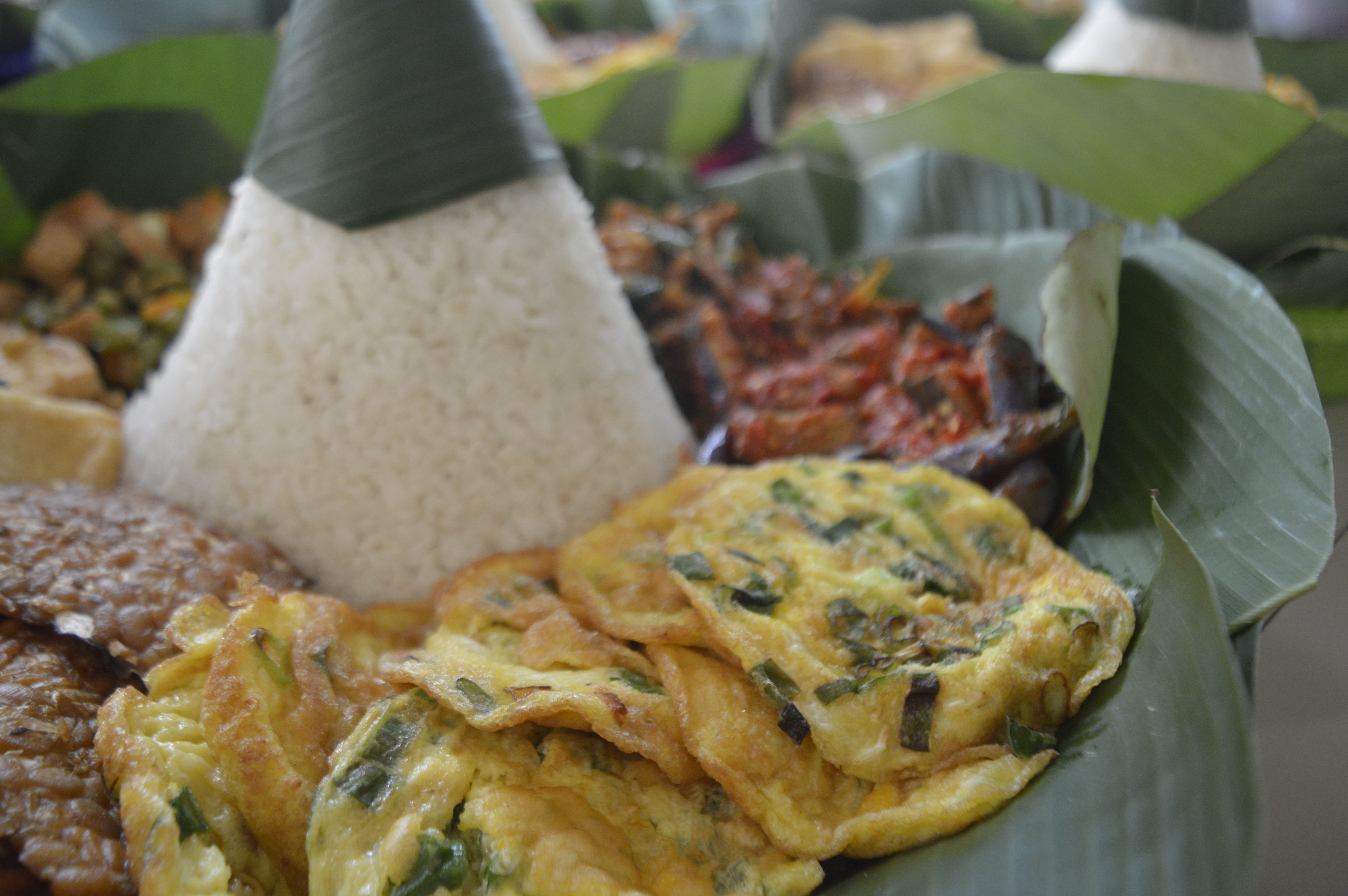 Jawa: Tumpeng yaiku sega kang disuguhaké nganggo lawuh kang manéka warna. Tumpeng iku biasané digawé nganggo sega kuning, ananging menawa kanggo acara kang ora formal uga bisa ngaggo sega putih. Lawuhé kayata endhog, osèng témpé, pitik panggang, kenthang gorèng, sambel teri lan liya-liyané manut sapa sing nggawé.